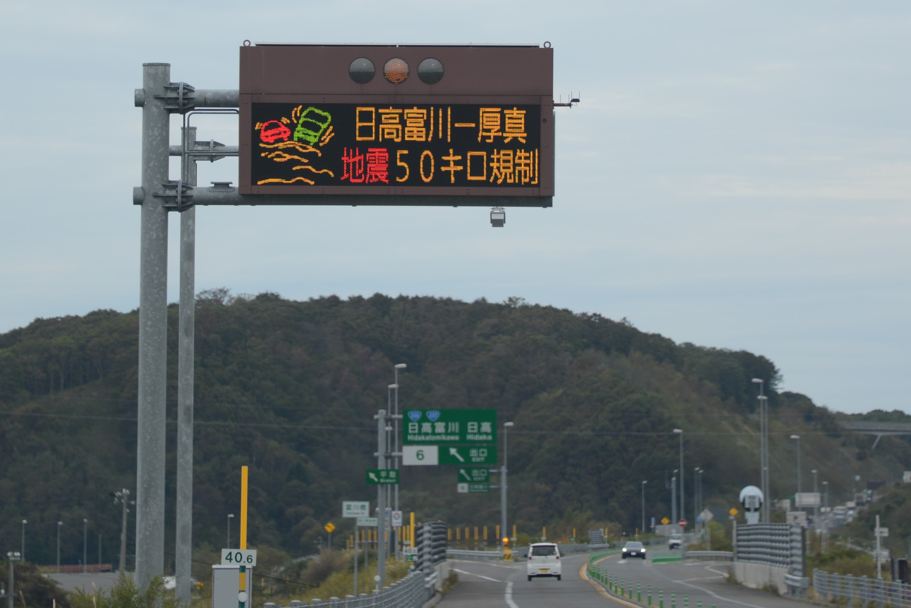 本線上における案内板